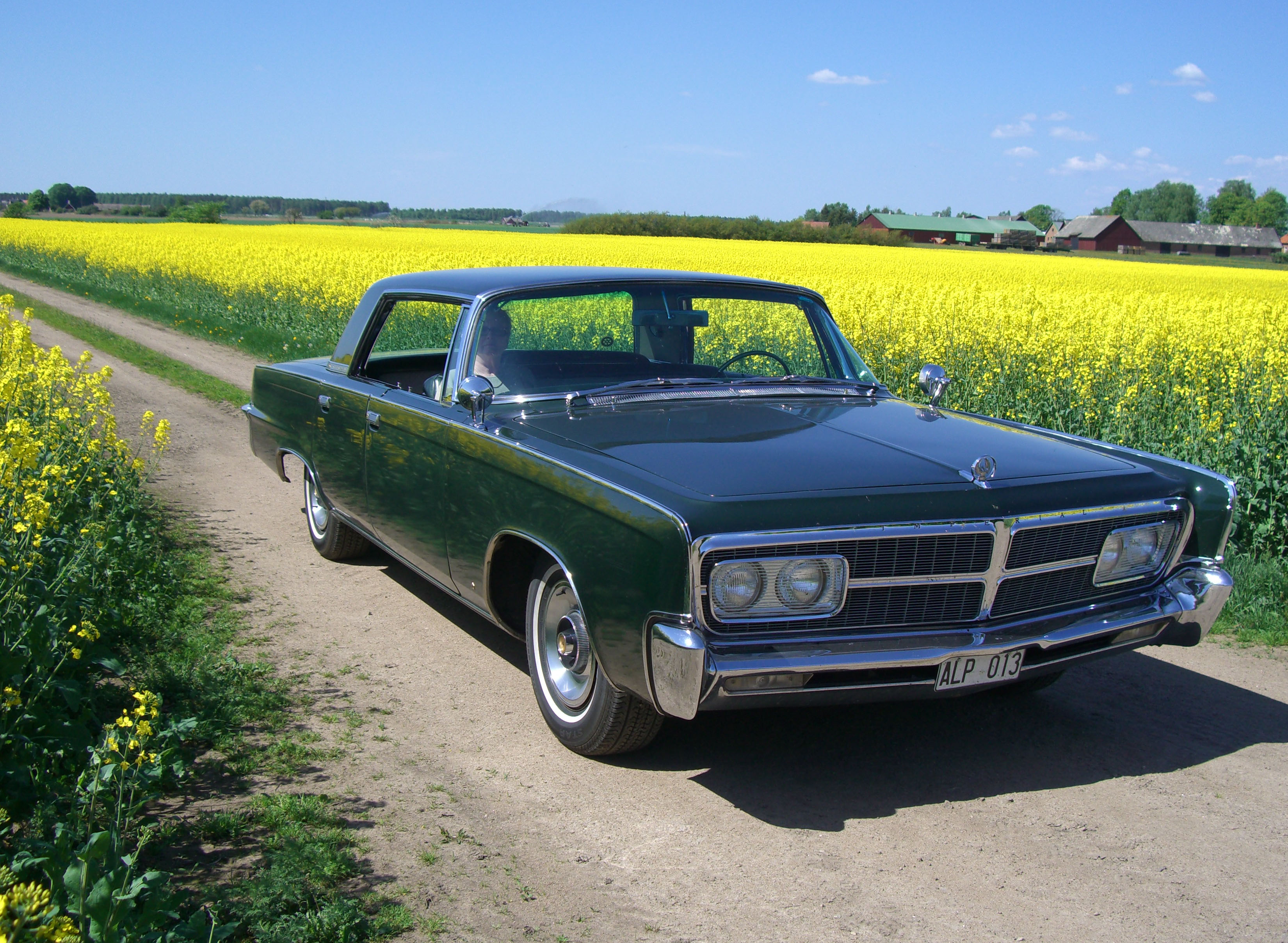 1965 Imperial Crown 4D HT i rapsfält våren 2008.